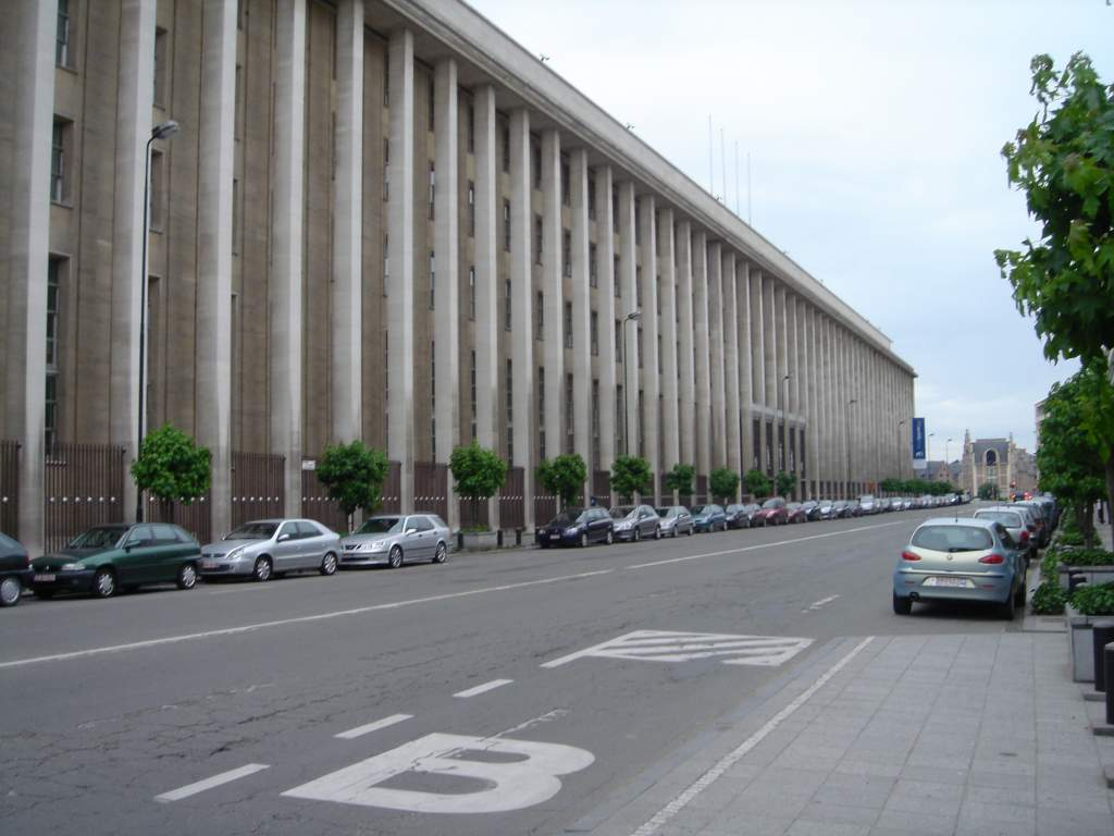 foto gebouw Nationale_bank_van_België.jpg bron: Serge Bibauw; licentie: CC 2.0